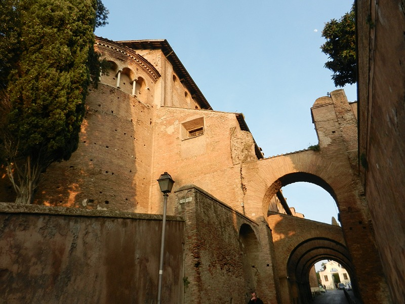 Roma - Abside della Basilica dei Ss. Giovanni e Paolo e Clivio di Scauro